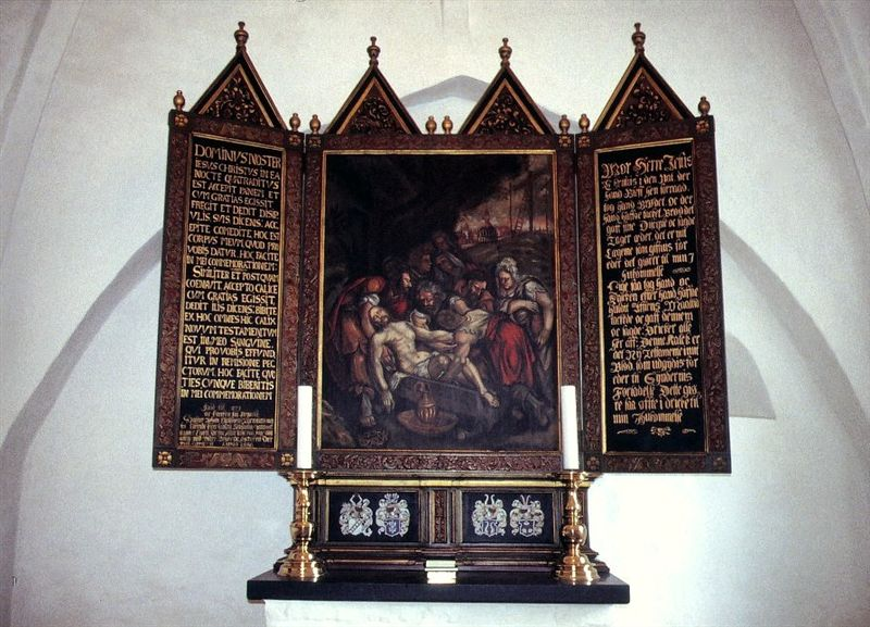 Bislev Kirke, Aalborg Kommune, altertavle